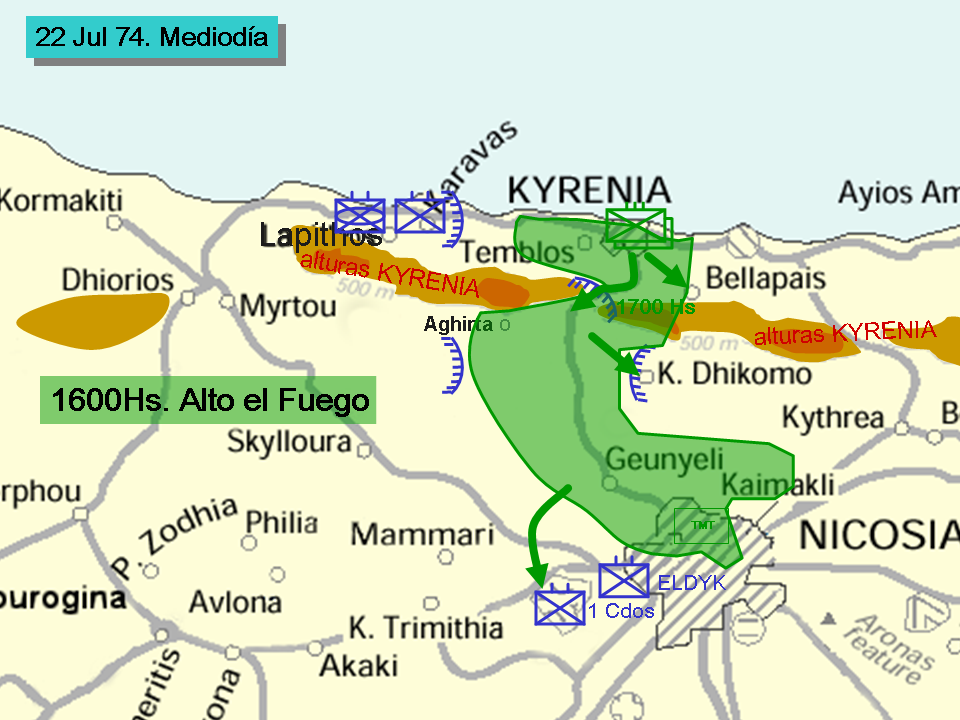 Situacion de las fuerzas al mediodia del 22 Jul 1974